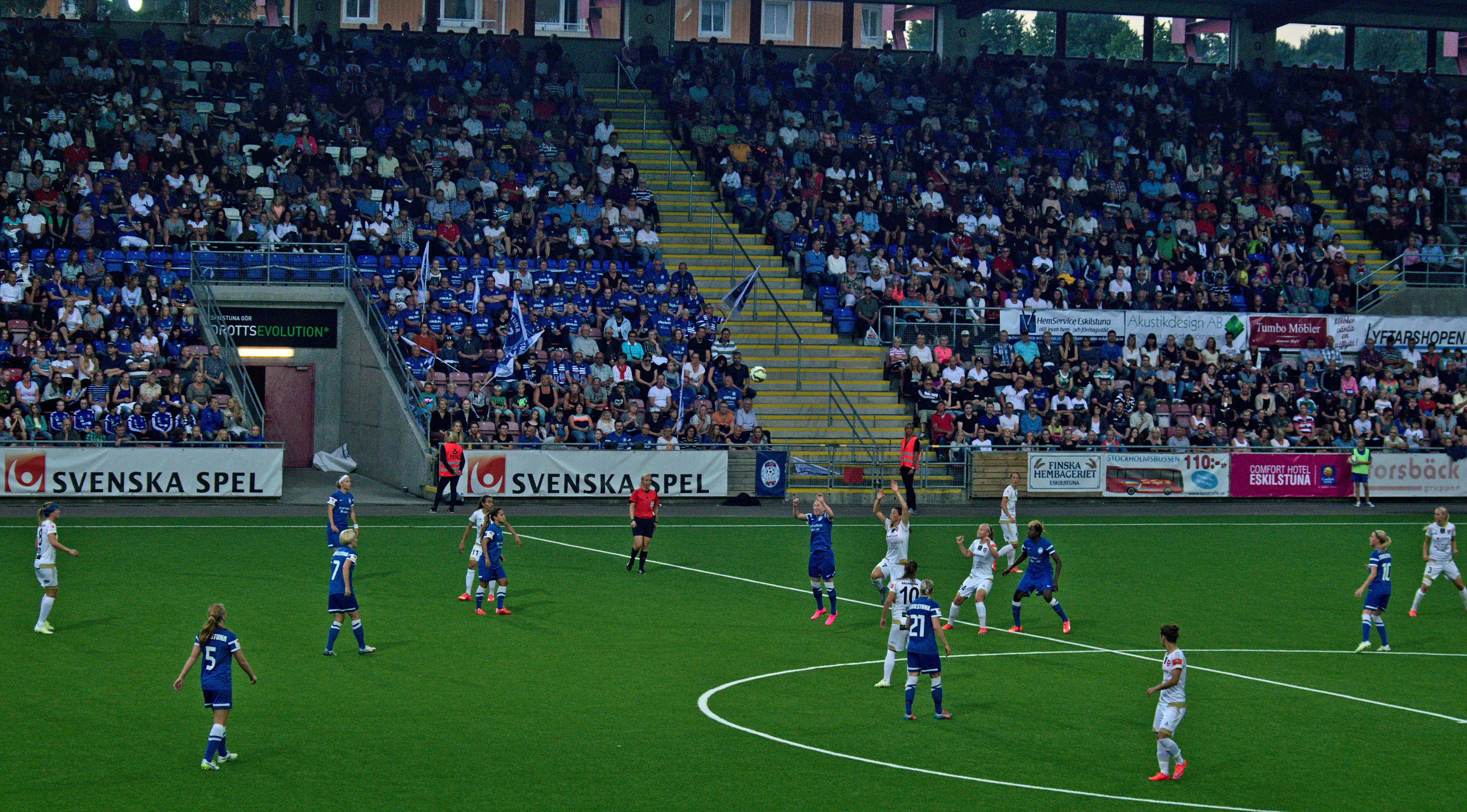 Eskilstuna United - FC Rosengård, Tunavallen i Eskilstuna 5 augusti 2015. Första halvlek.